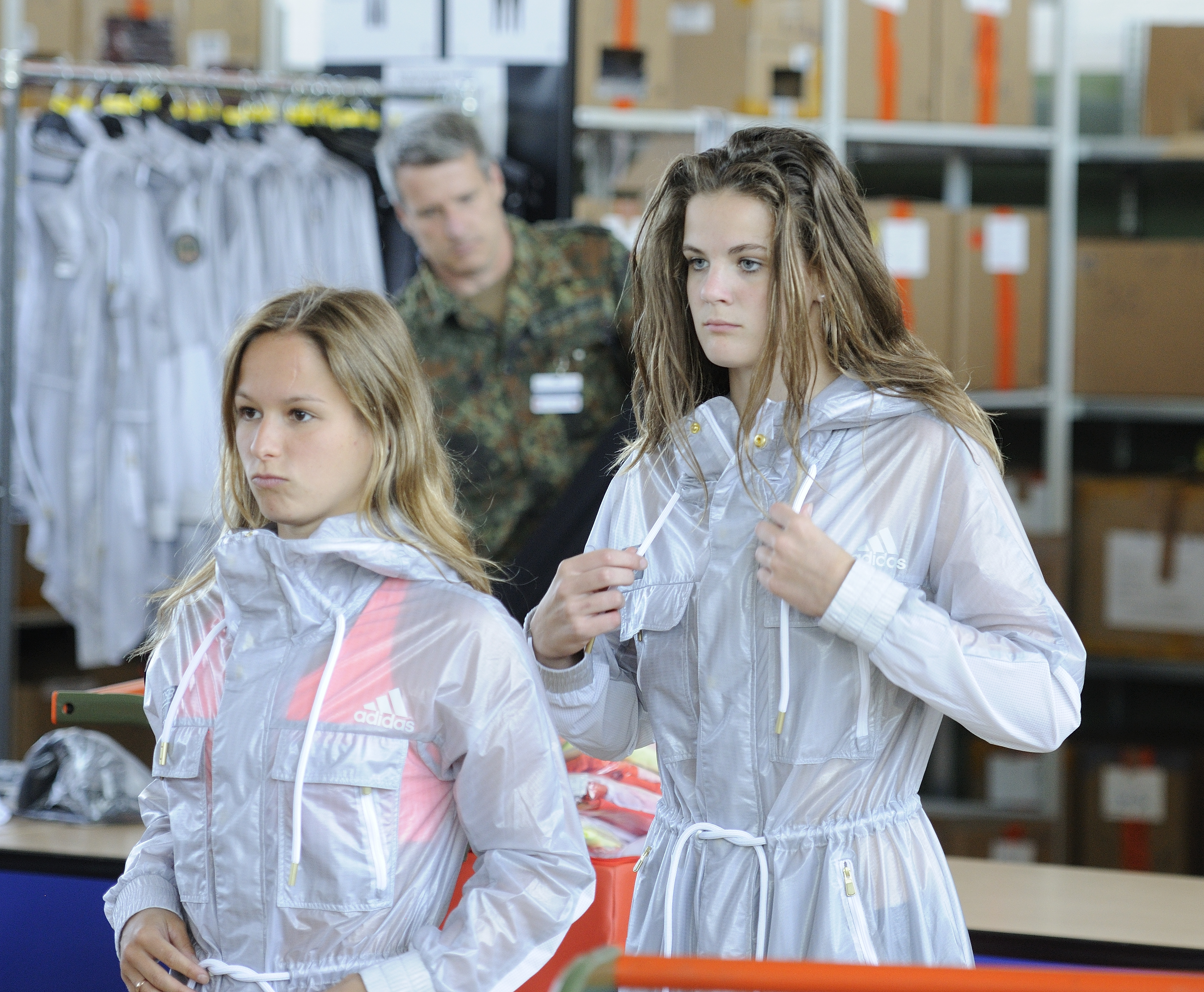 Bild aufgenommen in Hannover während der Einkleidung der deutschen Olympiamannschaft 2016. Elena Wassen und Maria Kurjo.